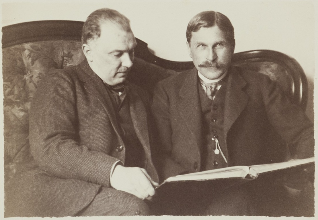 Jan Bułhak i Bogusław Kraszewski w Dołhem